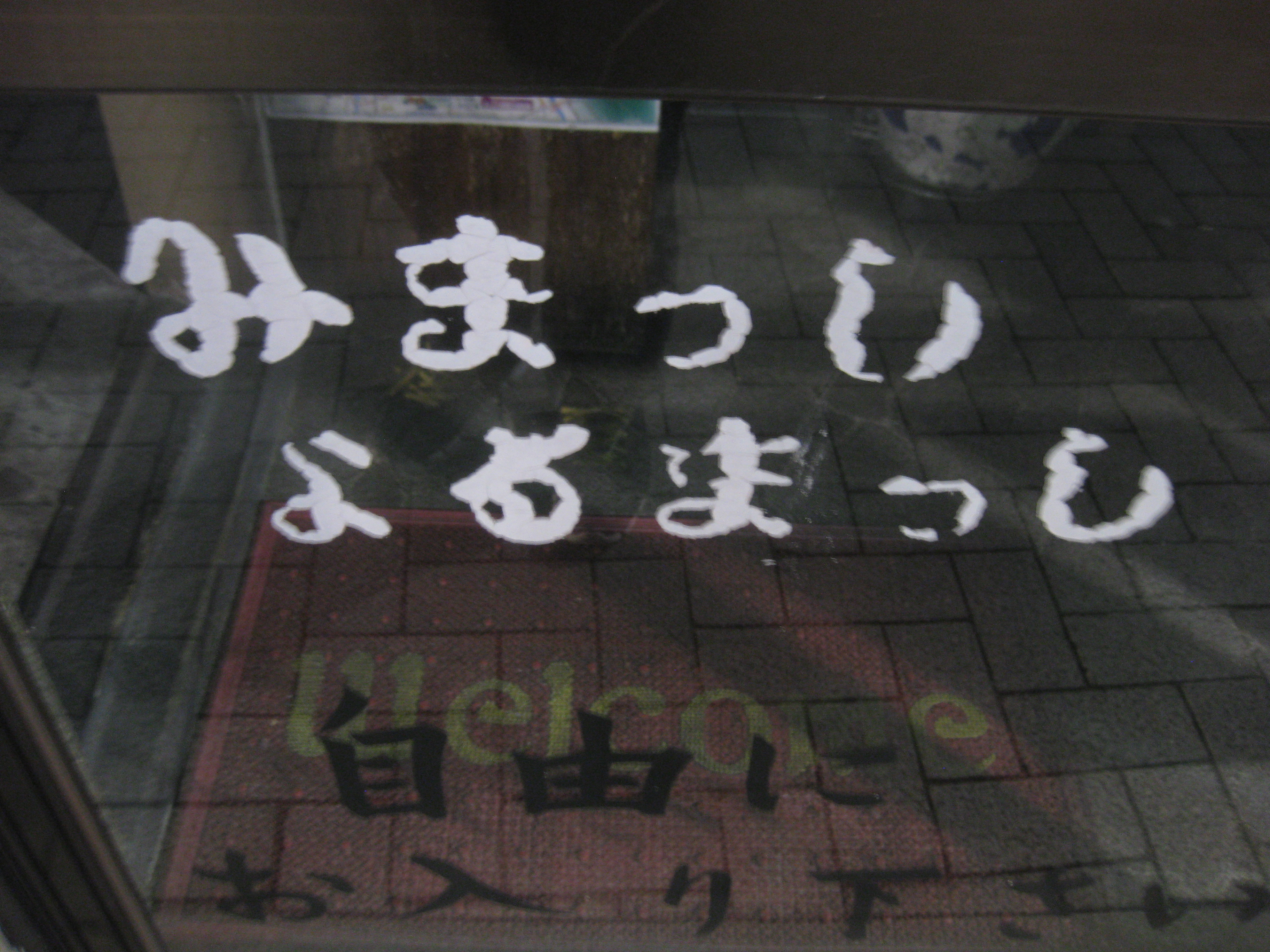 石川県金沢市内の商店入口に見られる金沢弁。